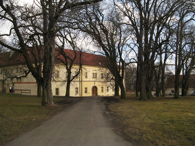 Zámek Mšec, Mšec 46